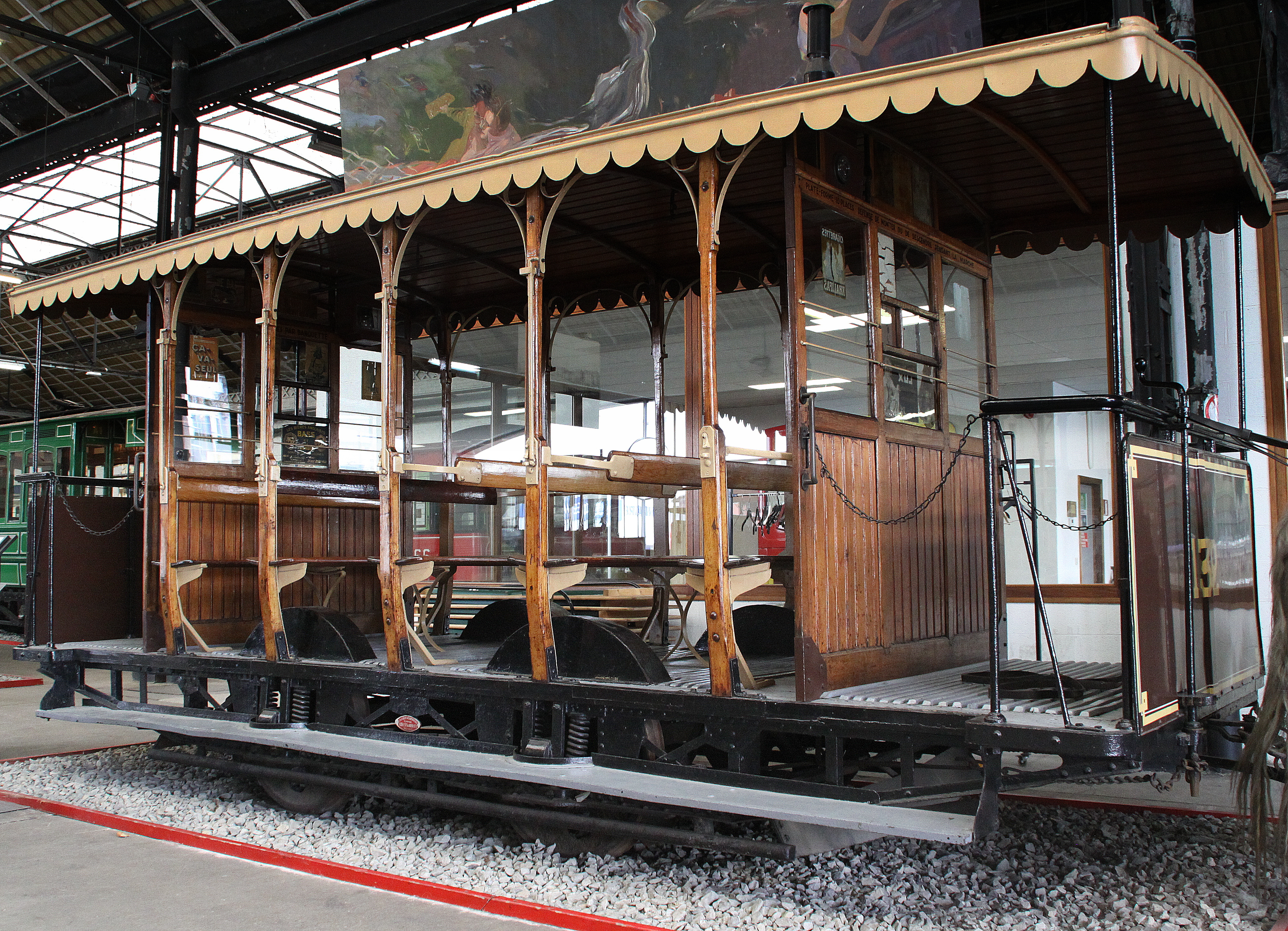 Chevaline 132 am Tramsmusée zu Léck